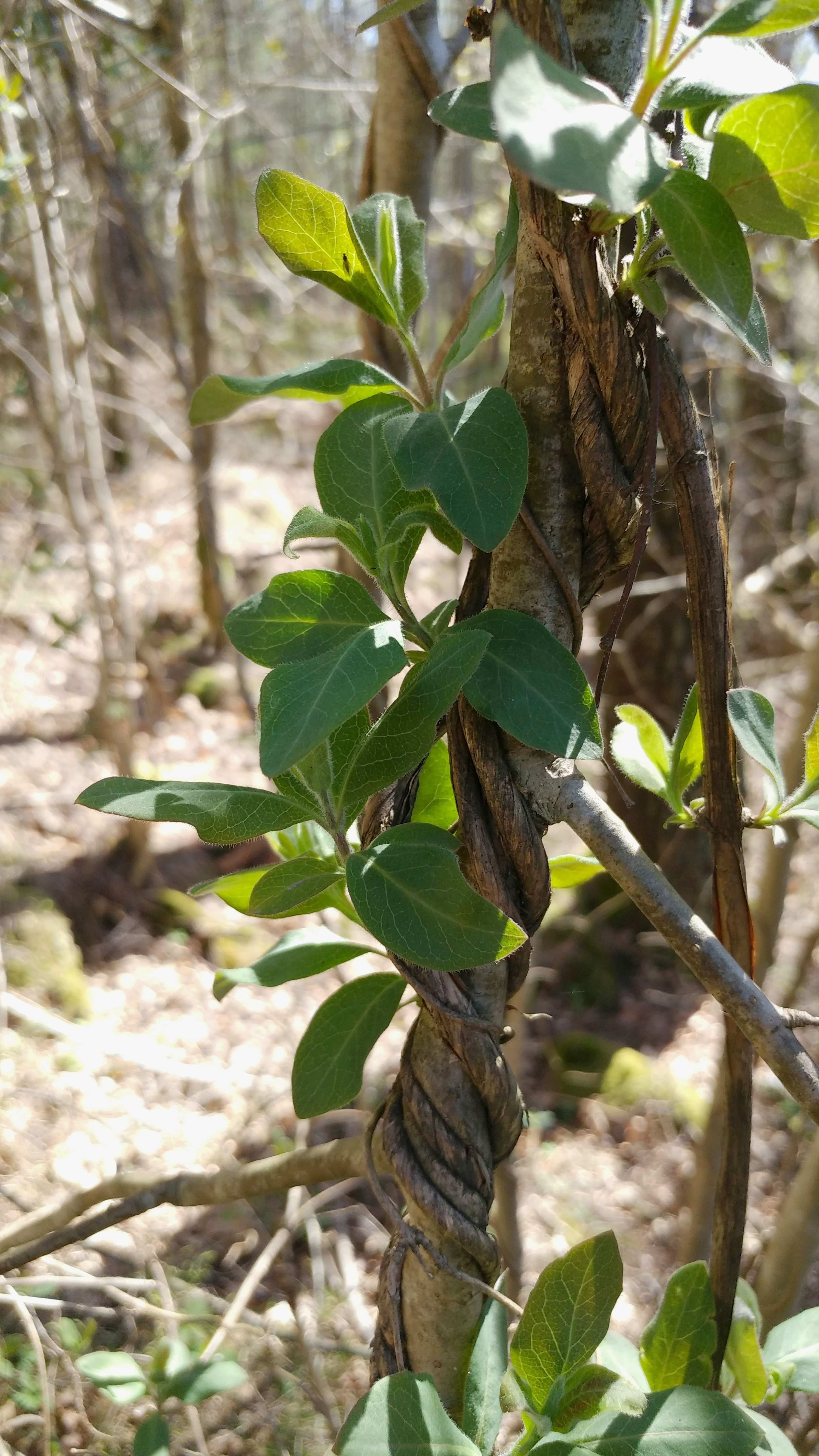 Vildkaprifol (Lonicera periclymenum) i Bergsjön, Göteborg, april 2020.